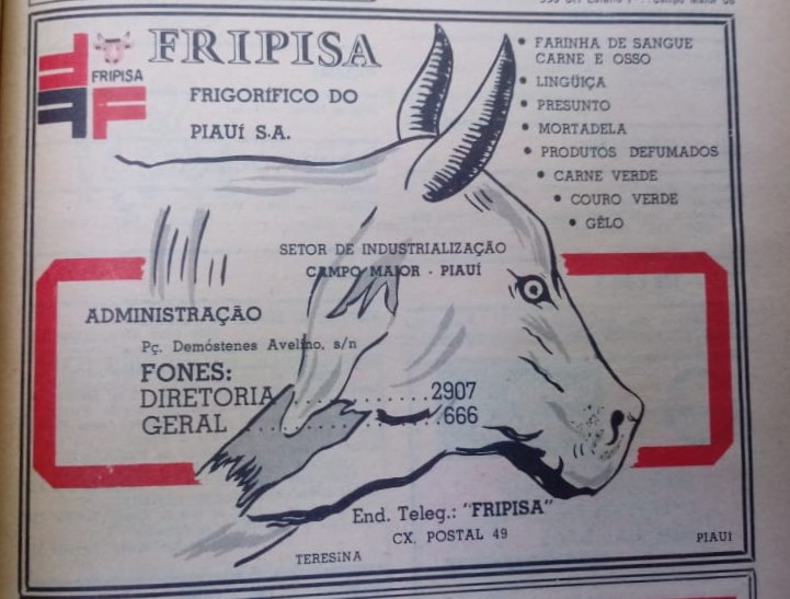 Cartaz dos produtos do extinto Fripisa em 1972.